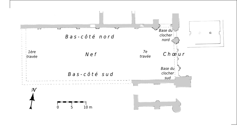 Plan des vestiges de l'église. En gris, les éléments conservés en élévation.